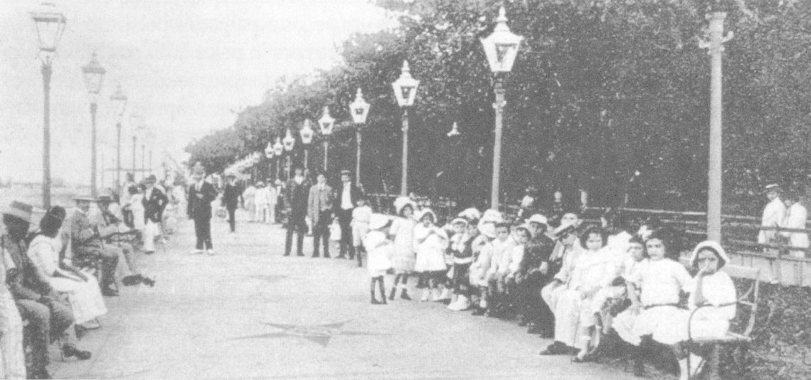 Passeio Público, in Fortaleza, Brasil.